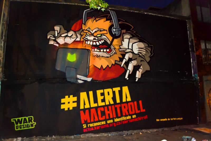 Graffiti de campaña